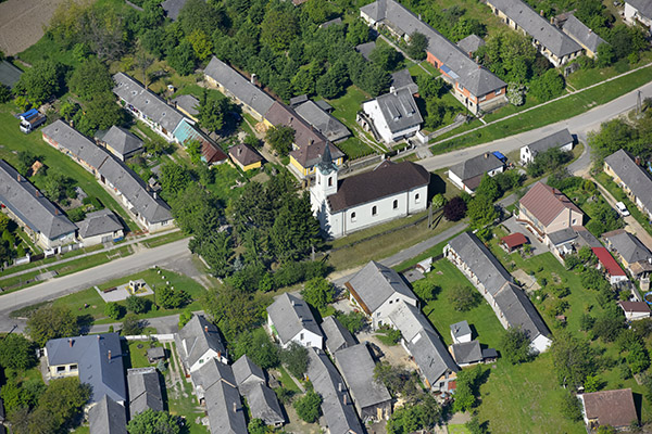 Jásd temploma a levegőből